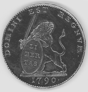 Monnaie des Etats belgiques unis DOMINI EST REGNUM - Révolution brabançonne de 1790 - Lion tenant LIBERTAS